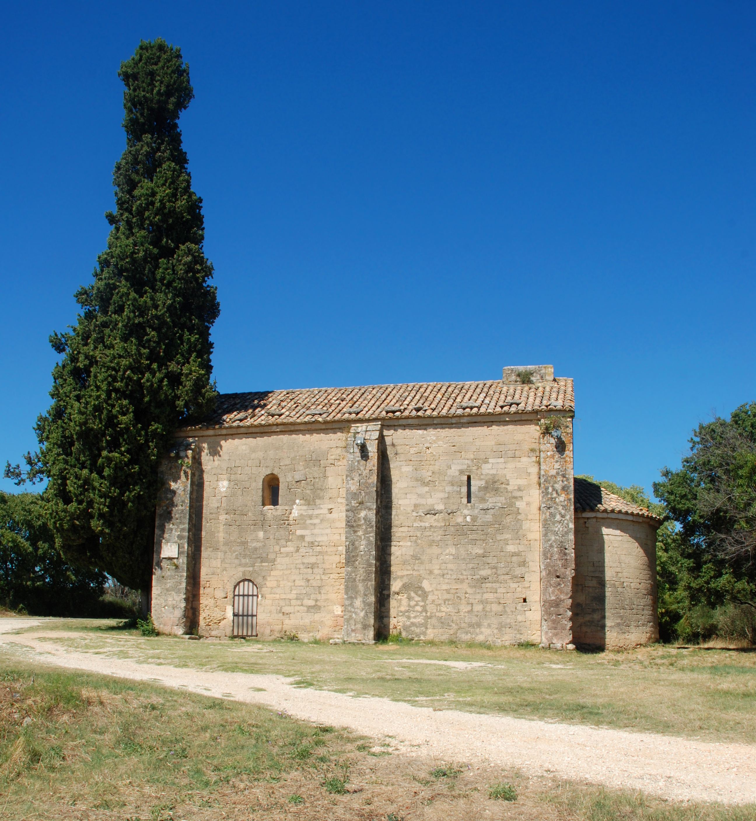 France - Gard - Chapelle Saint-Caprais de Castillon-du-Gard .